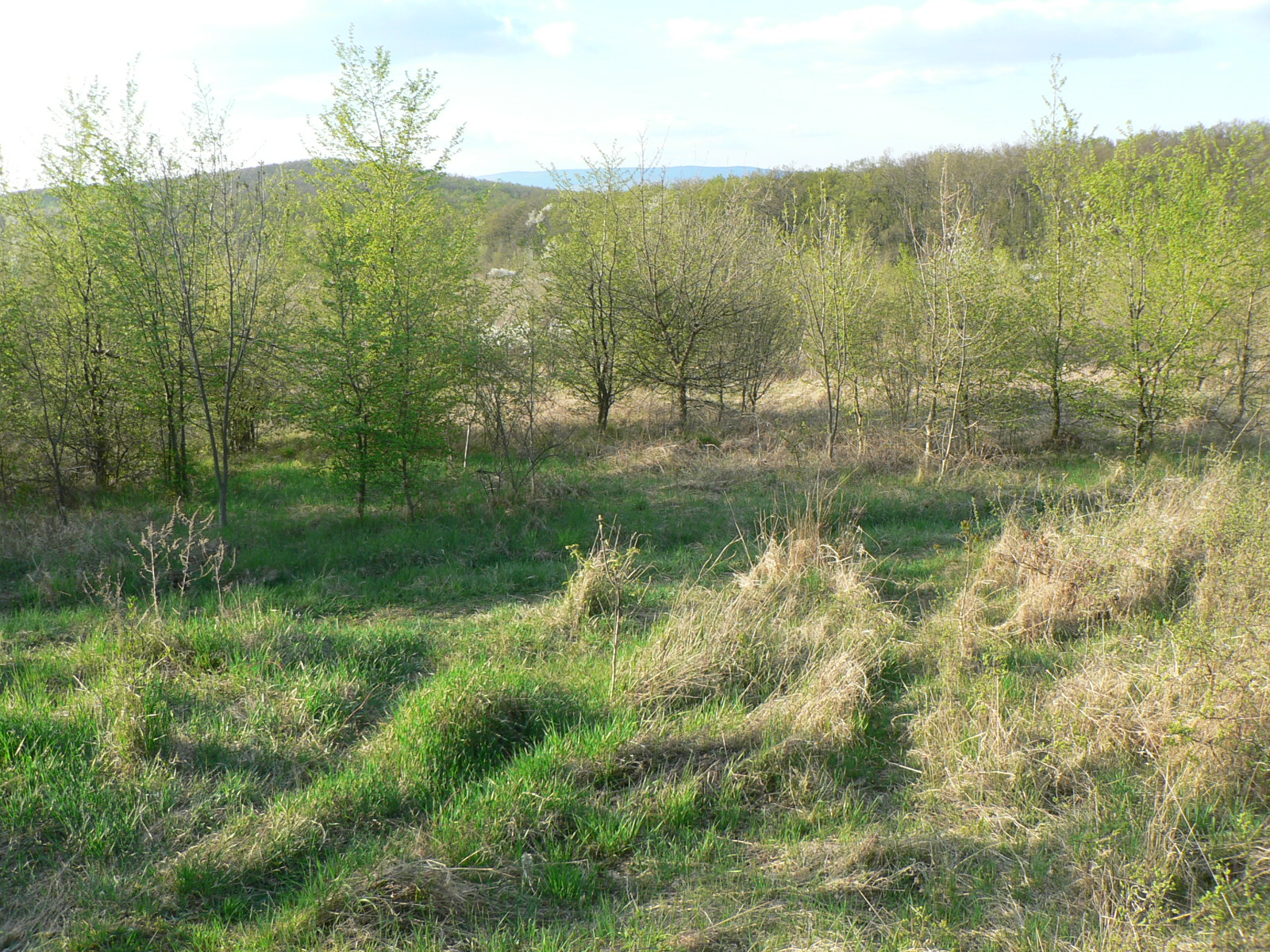 A Kovácsi erdőföldek jellemző látképe 2015-ben délkelet felől Kovácsi Forest in Buda Hills, Duna-Ipoly National Park